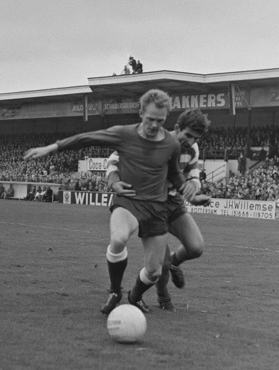 Henk Tijm (Alkmaar) schermt de bal af voor Xerxes speler Lazar Radovic